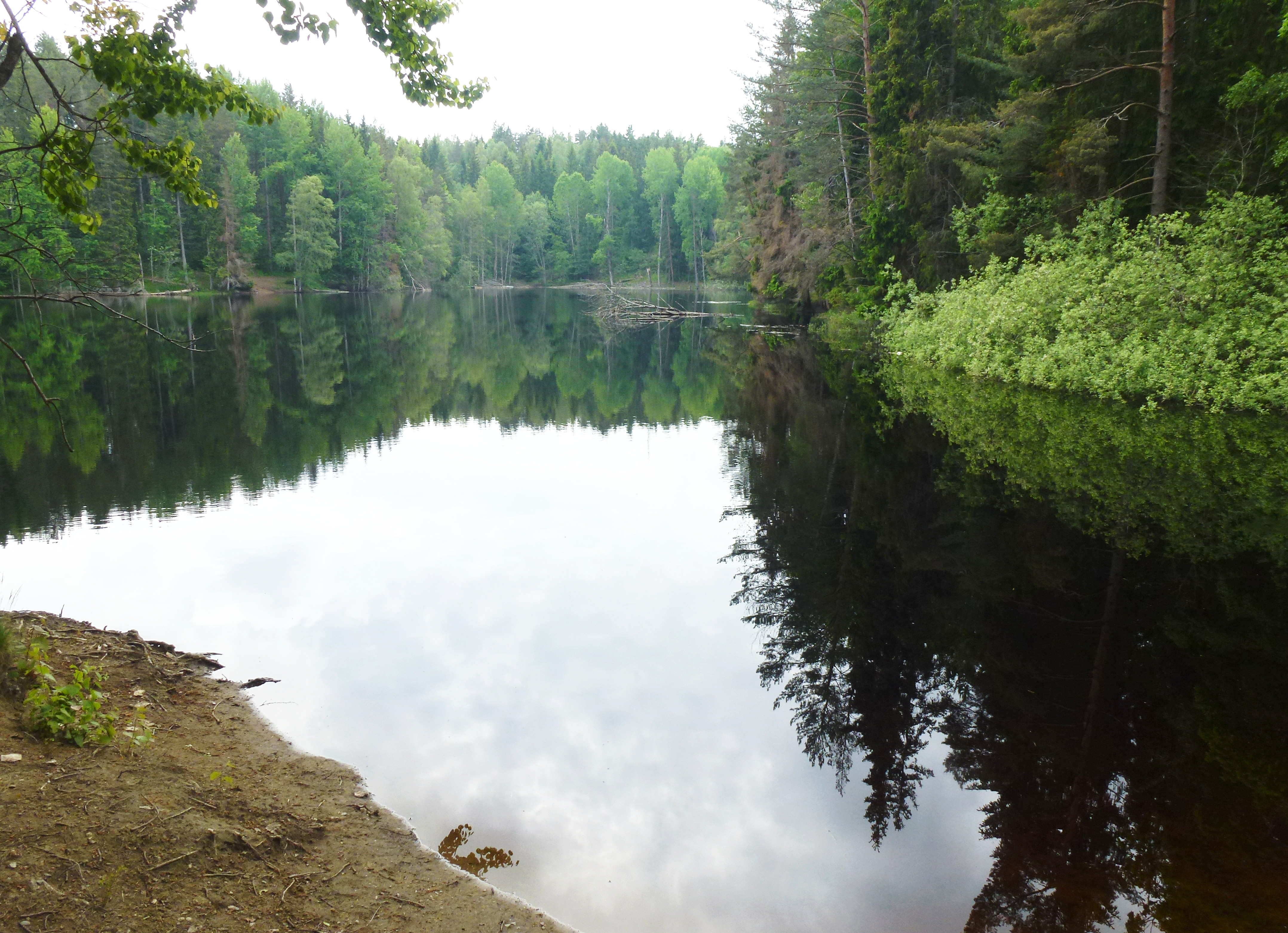 Trollsjöns södra del